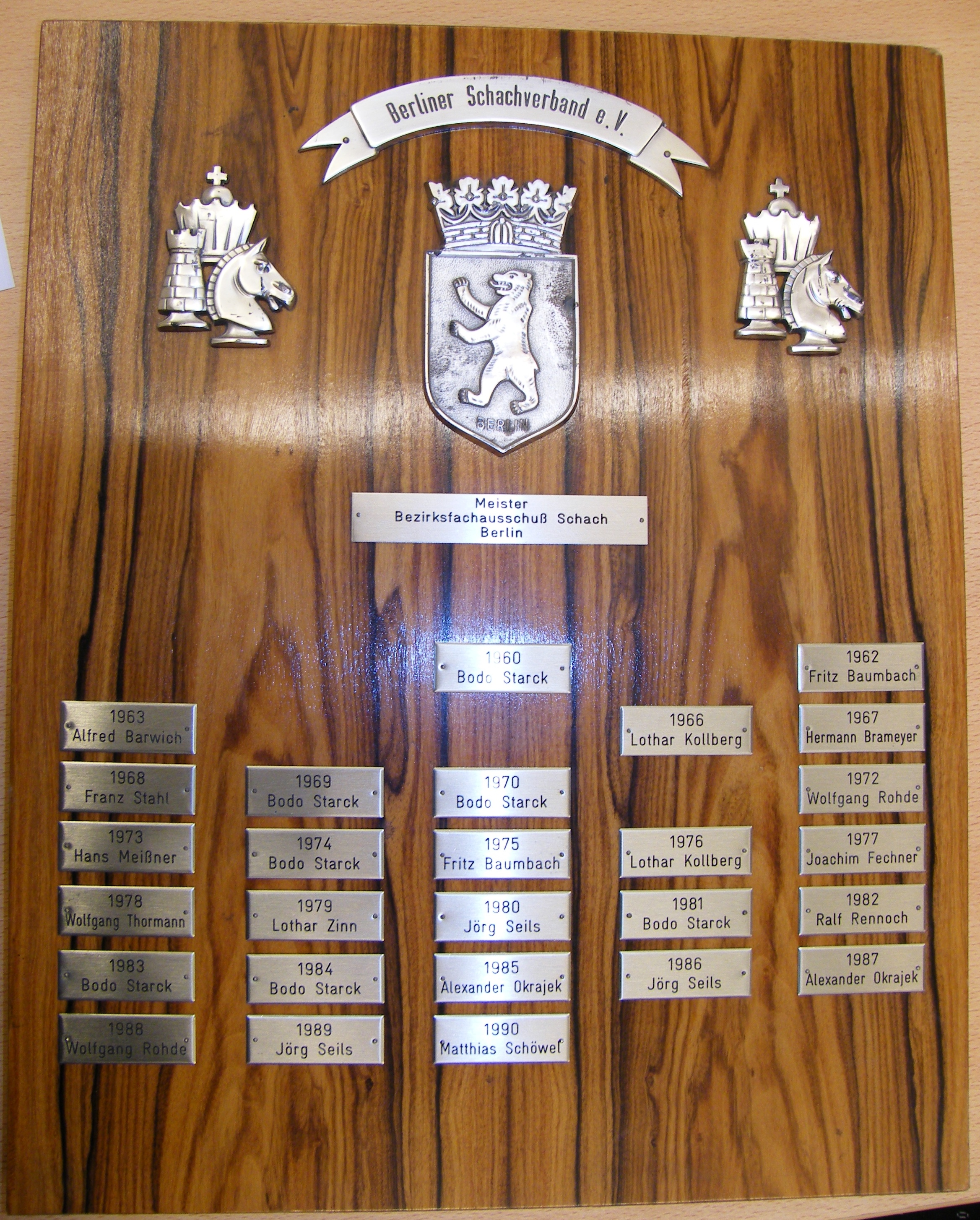 Ehrentafel der Berliner und West-Berliner Schachmeister von 1946 bis 2001. Die Tafel hängt in der Geschäftsstelle des Berliner Schachverbandes.